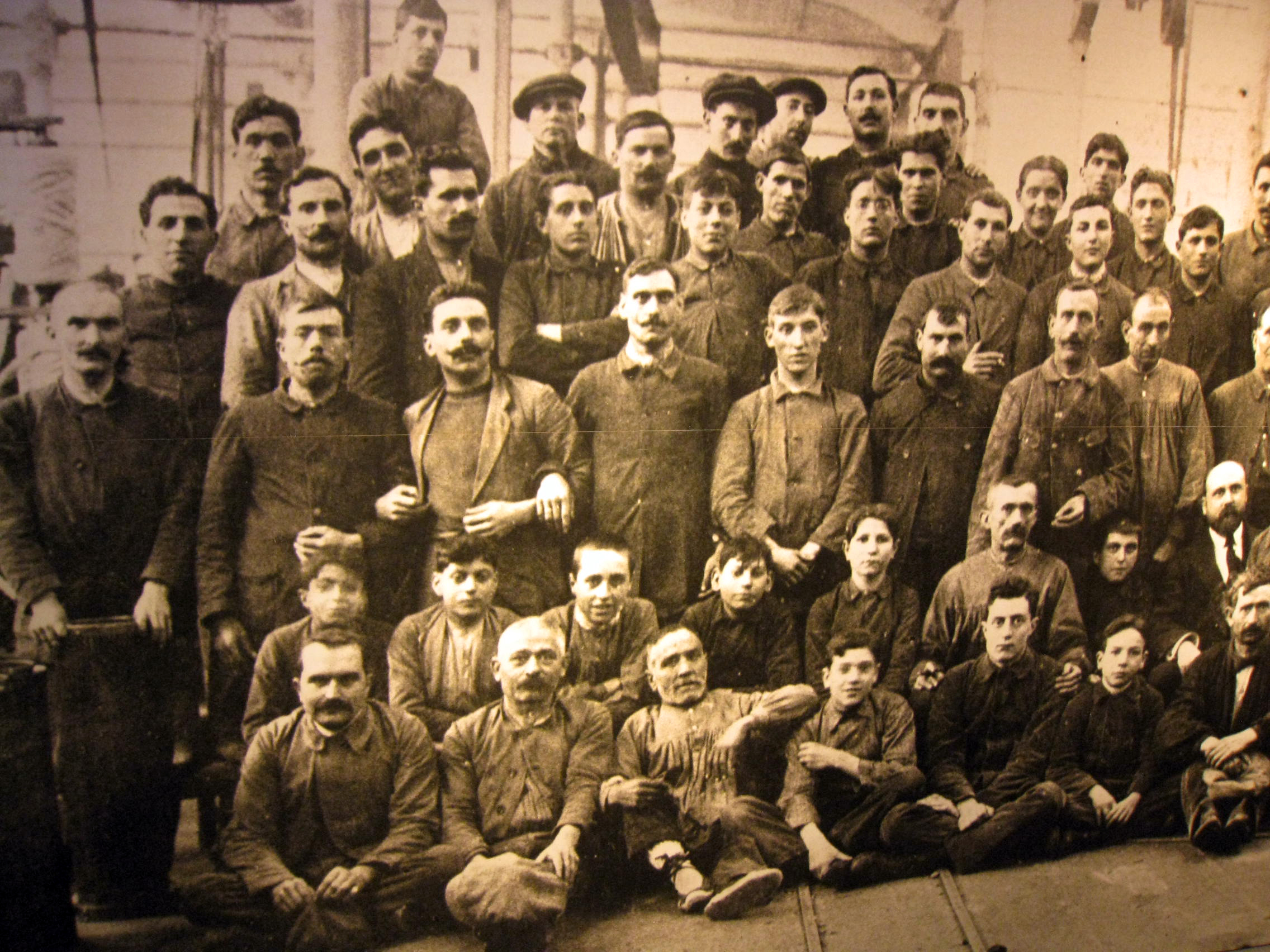 Fàbrica Aymerich, Amat i Jover (Terrassa) Object location41° 33′ 54.49″ N, 2° 00′ 28.14″ E